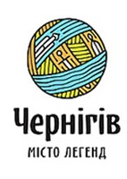 Оф. логотип города Чернигова